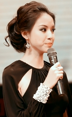 Hic hic, 70-200 f/4 ch?p khoai qu�! :(( ISO ??n 800 r?i m� v?n c�n x??ng (1/100s@200mm)! Ki?u n�y kh�ng s?m th� mu?n l?i l�n f/2.8 th�i... :((